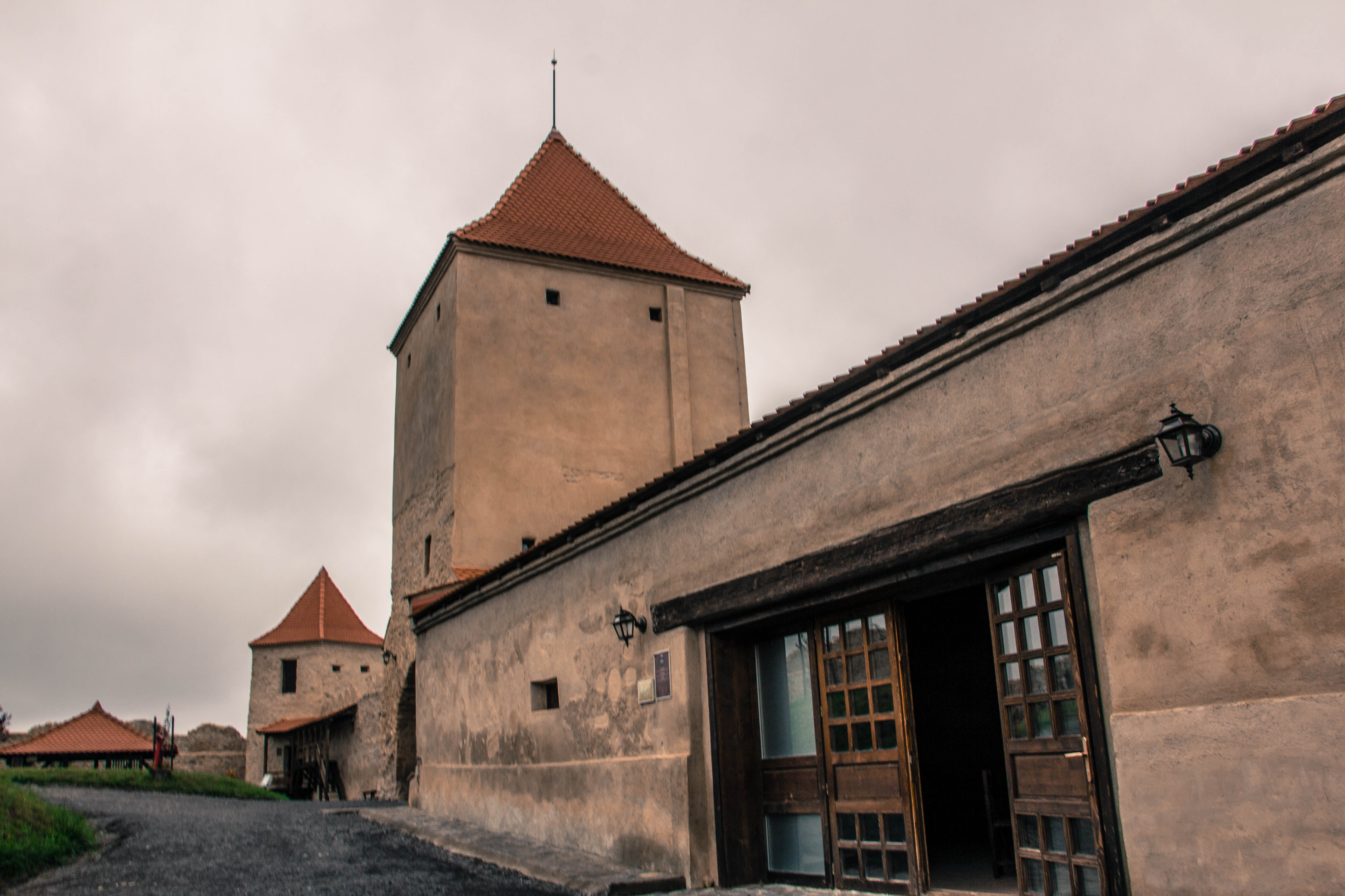 Cetatea Rupea (Cetatea Cohalmului)